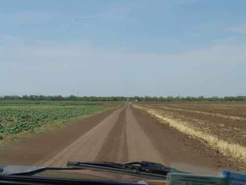 Полевая дорога